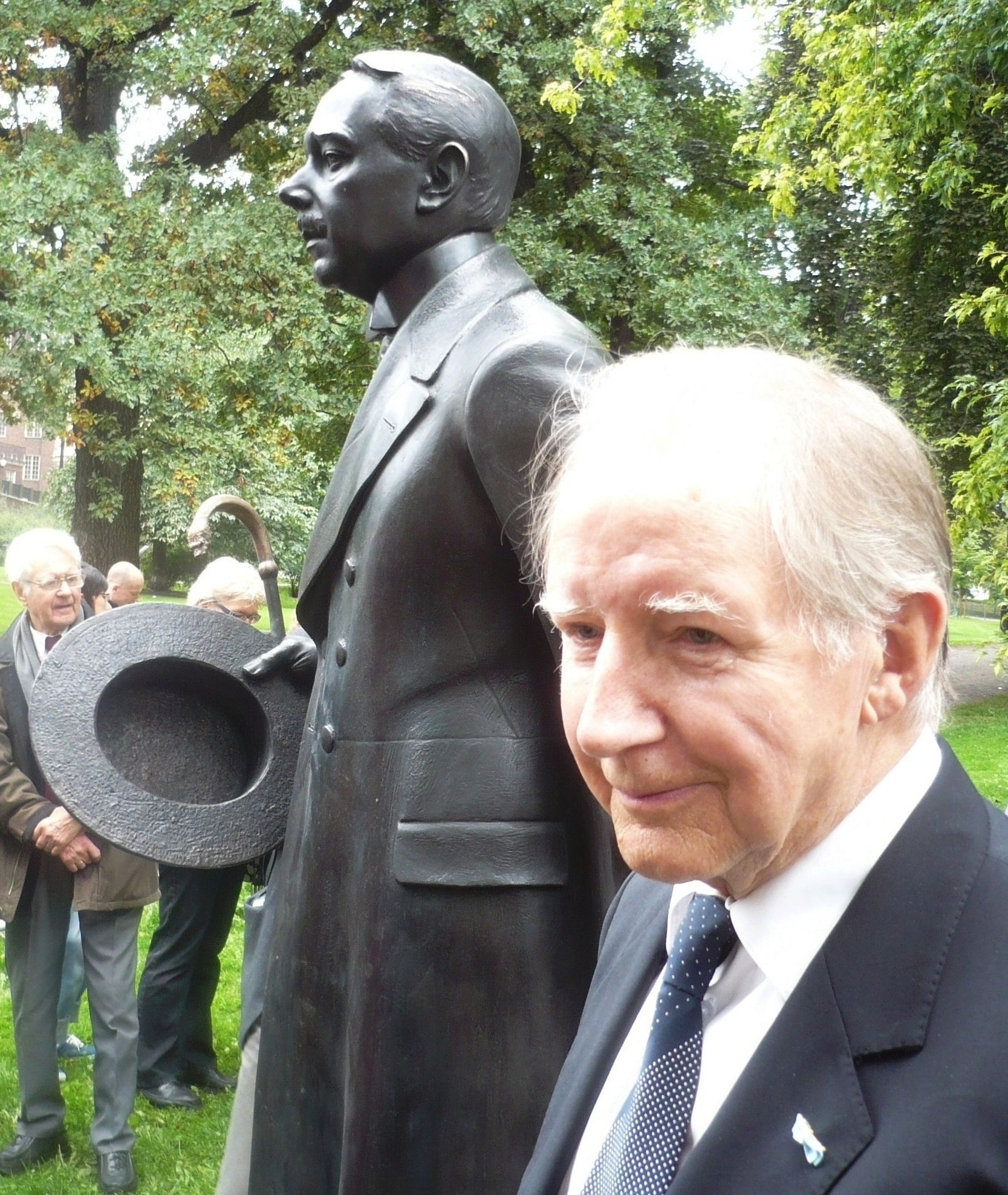 Den 11 september 2010 avtäcktes statyn av Hjalmar Söderberg framför Kungliga biblioteket i Humlegården. Här med en frontalfigur i Söderberg-sammanhang - litteraturdocenten och författaren Bure Holmbäck (1923-2013).